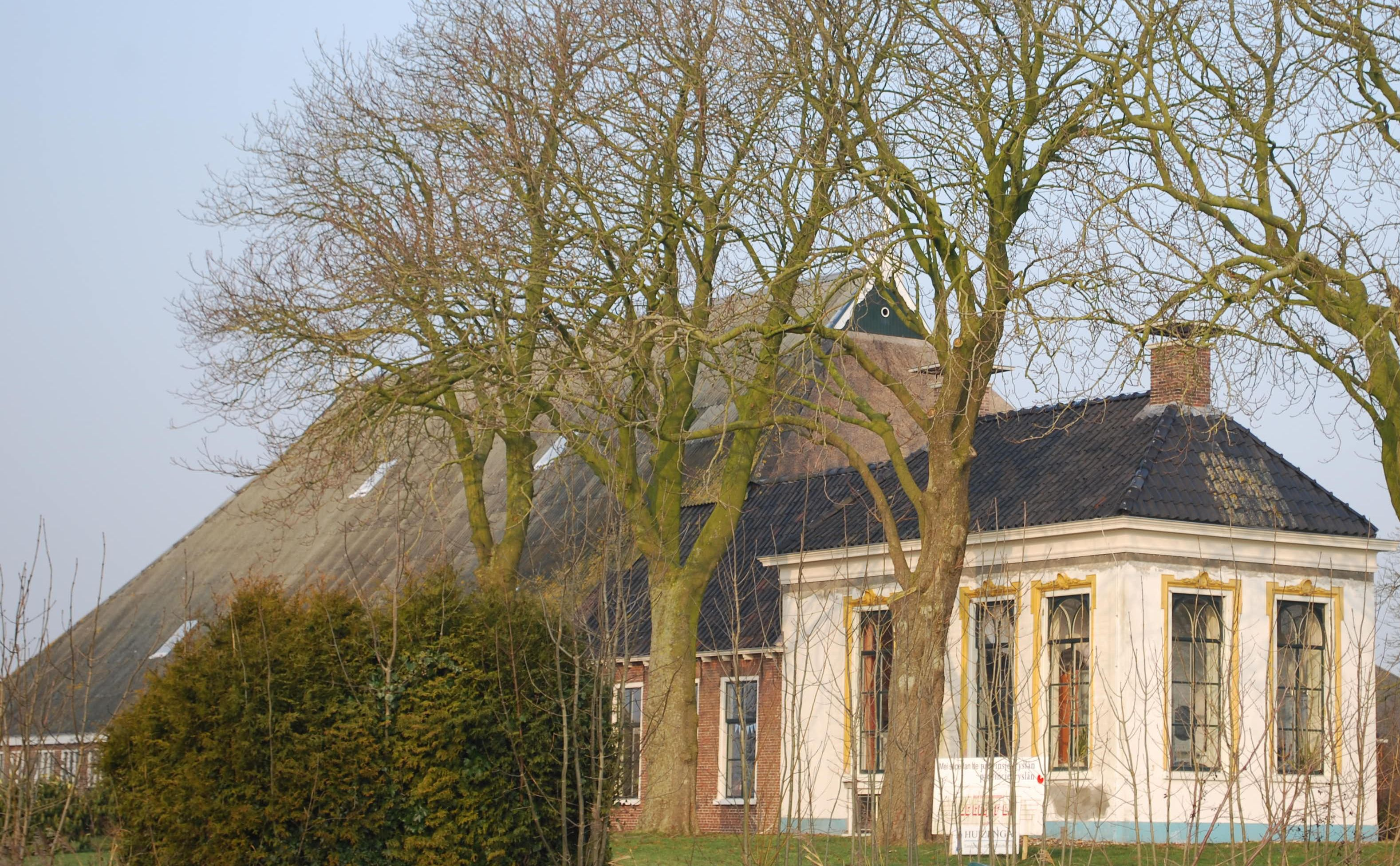 Boerderij Willem Loréweg 22, Kollum